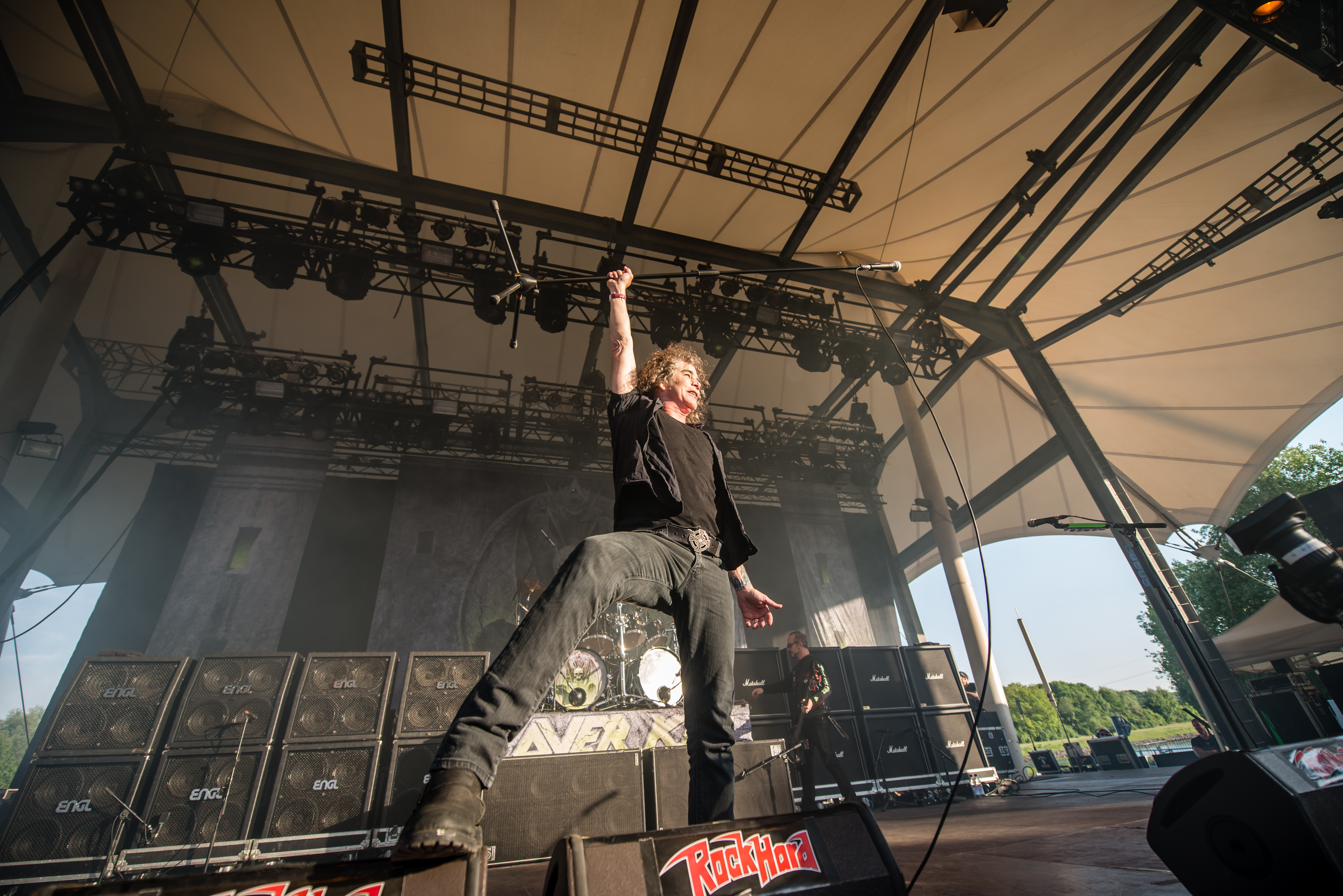 'Rock Hard Festival 2015; Gelsenkirchen Amphitheater': 'Overkill'